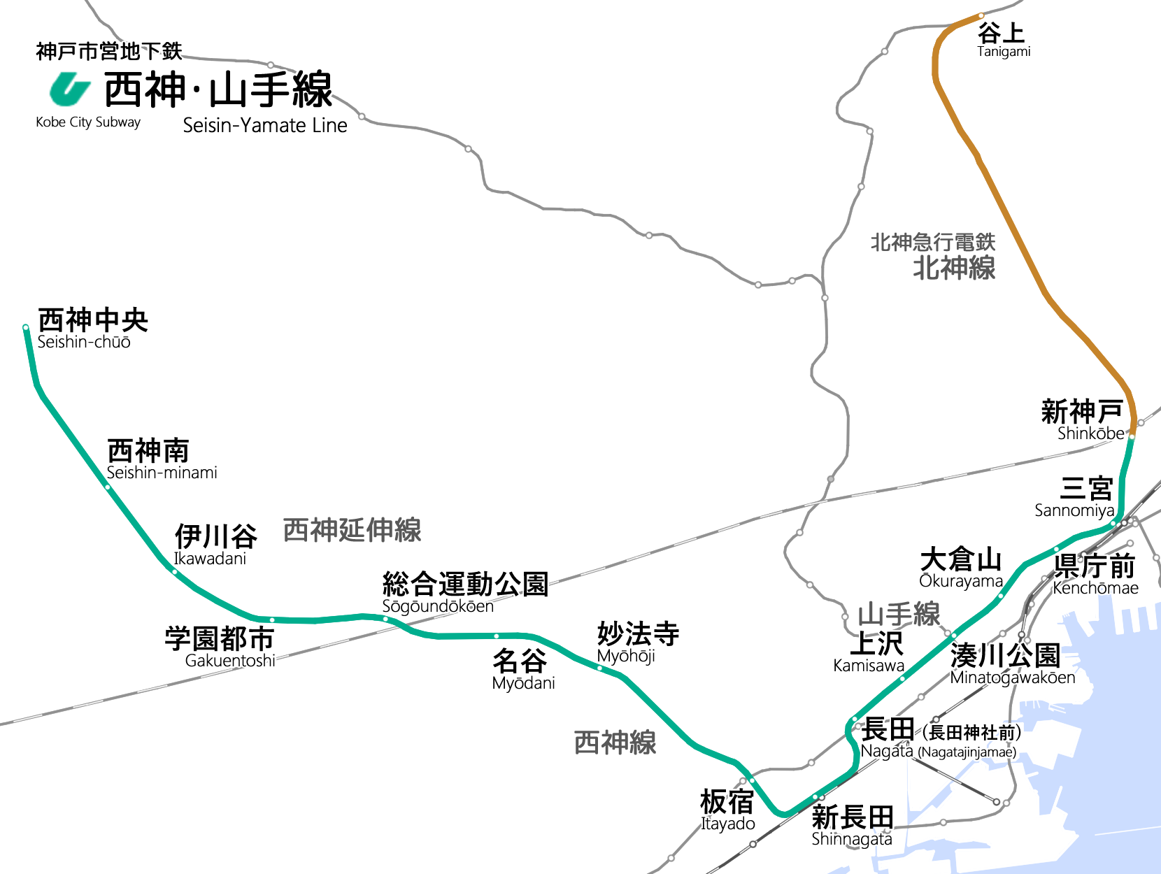 神戸市営地下鉄西神・山手線の路線図